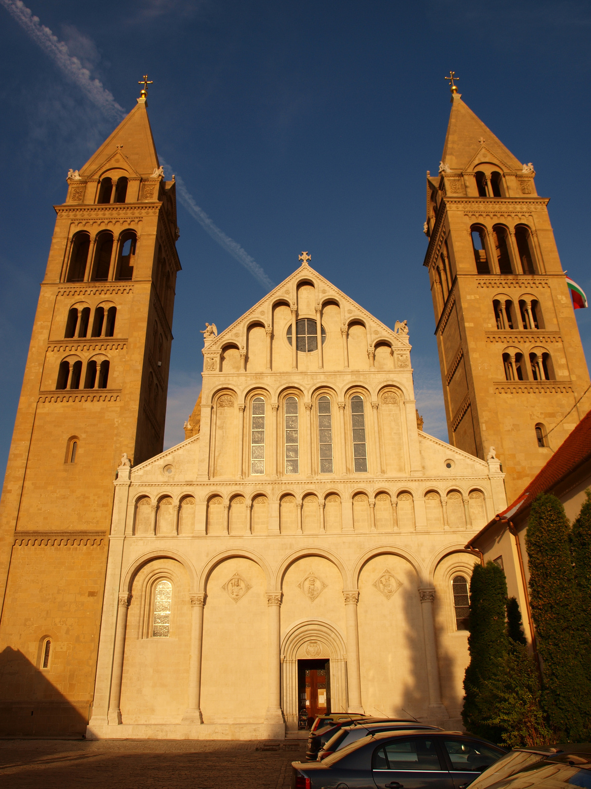 Székesegyház (Pécs, Dóm tér 23.)